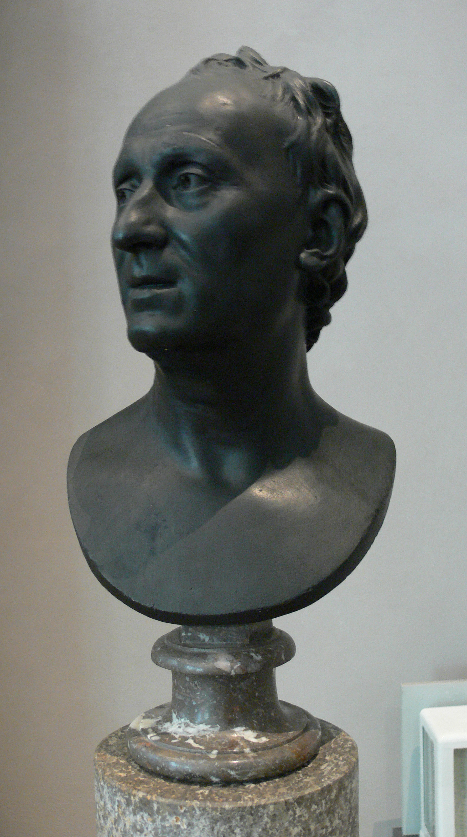 Büste Denis Diderot, Paris 1780 Gips, originale Fassung Bayerisches Nationalmuseum München; Geschenk des Freundeskreises des BNM, Inv. Nr. 65/3